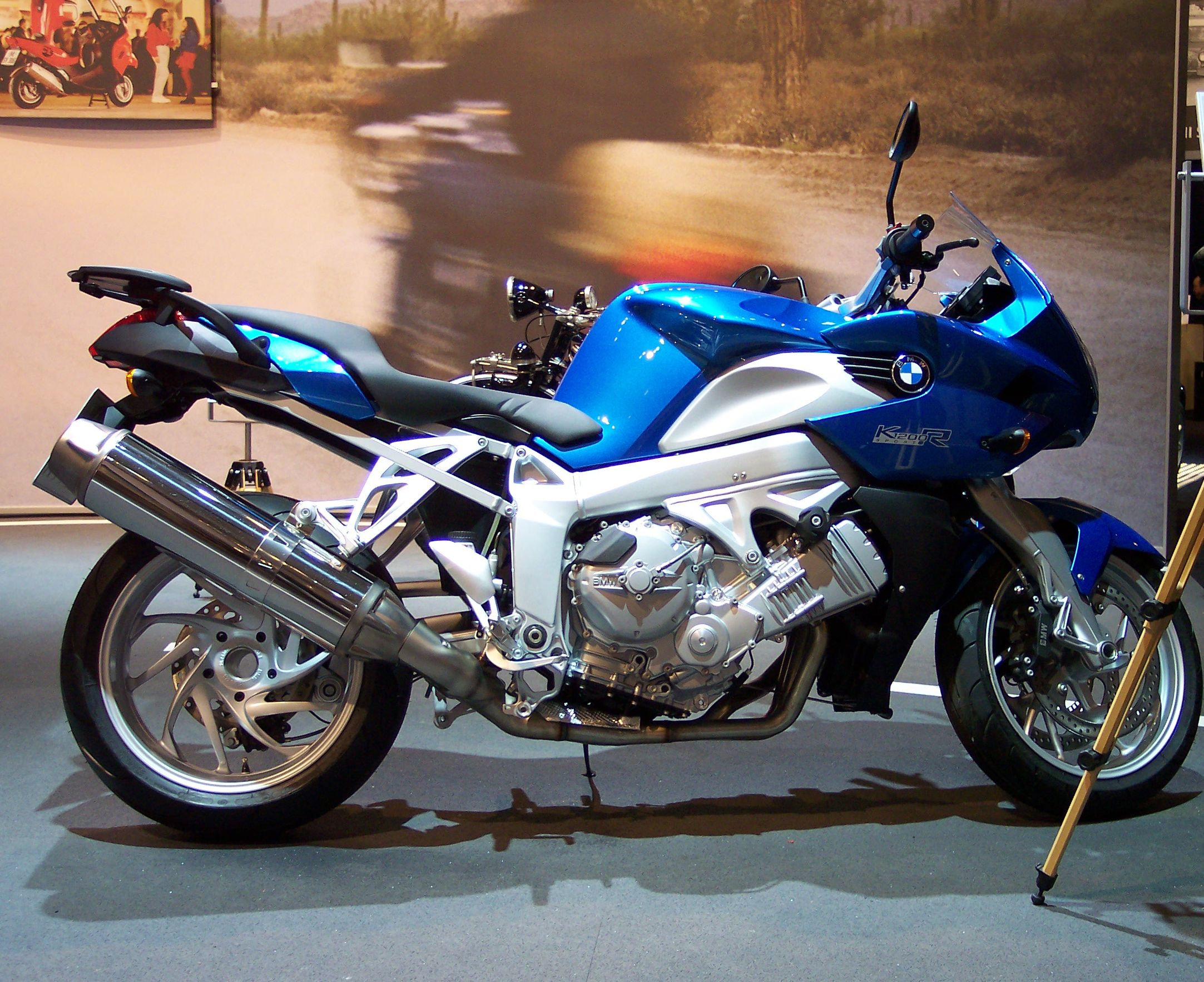 BMW K 1200 R Sport